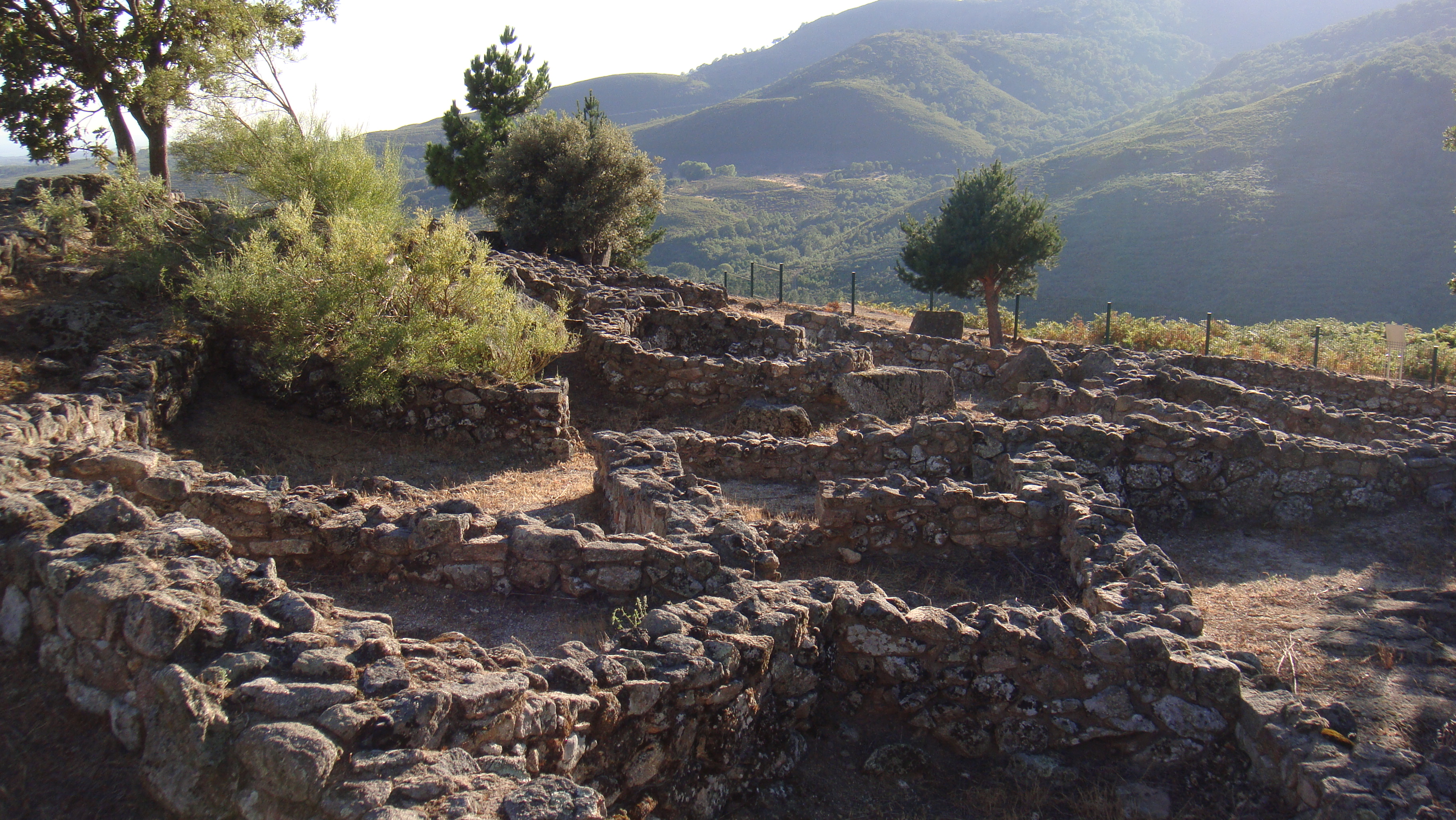 Viviendas. Castro de El Raso (El Reillo), Candeleda, Ávila (España)